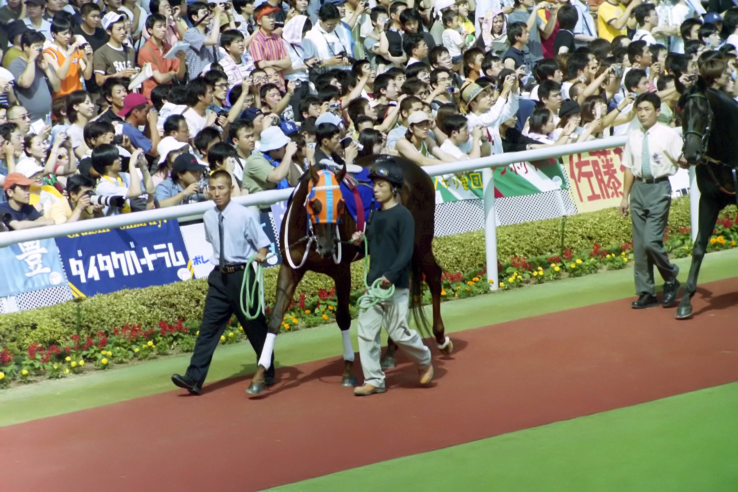 マイソールサウンド 2003年宝塚記念